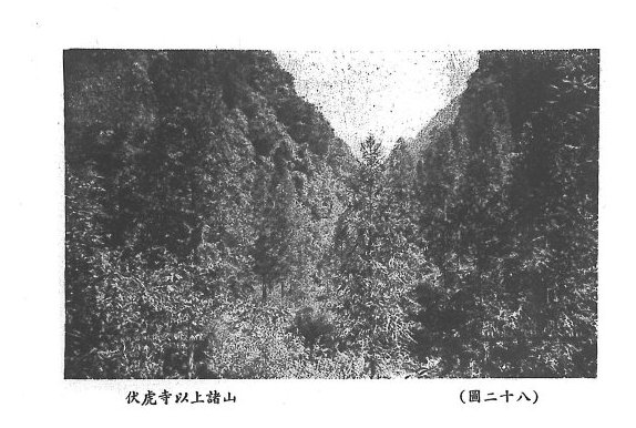 峨眉山老照片